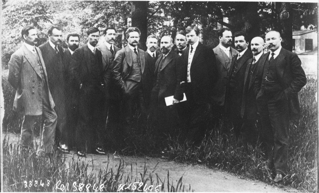 Социал-демократическая фракция в 4-ой Государственной Думе. В центре Р. Малиновский, первый справа - Маньков, второй - Е. И. Ягелло, шестой - Скобелев, седьмой - Н. С. Чхеидзе